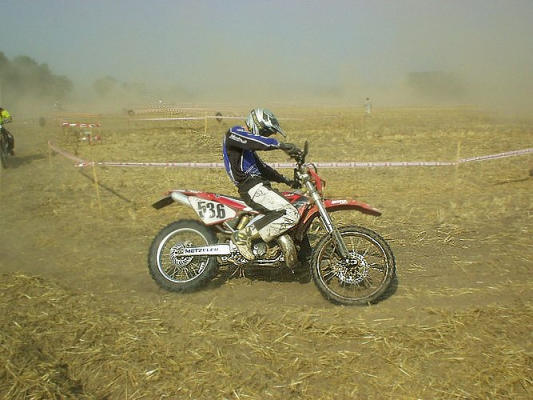 Enduro - Wettbewerb Hassloch 2002